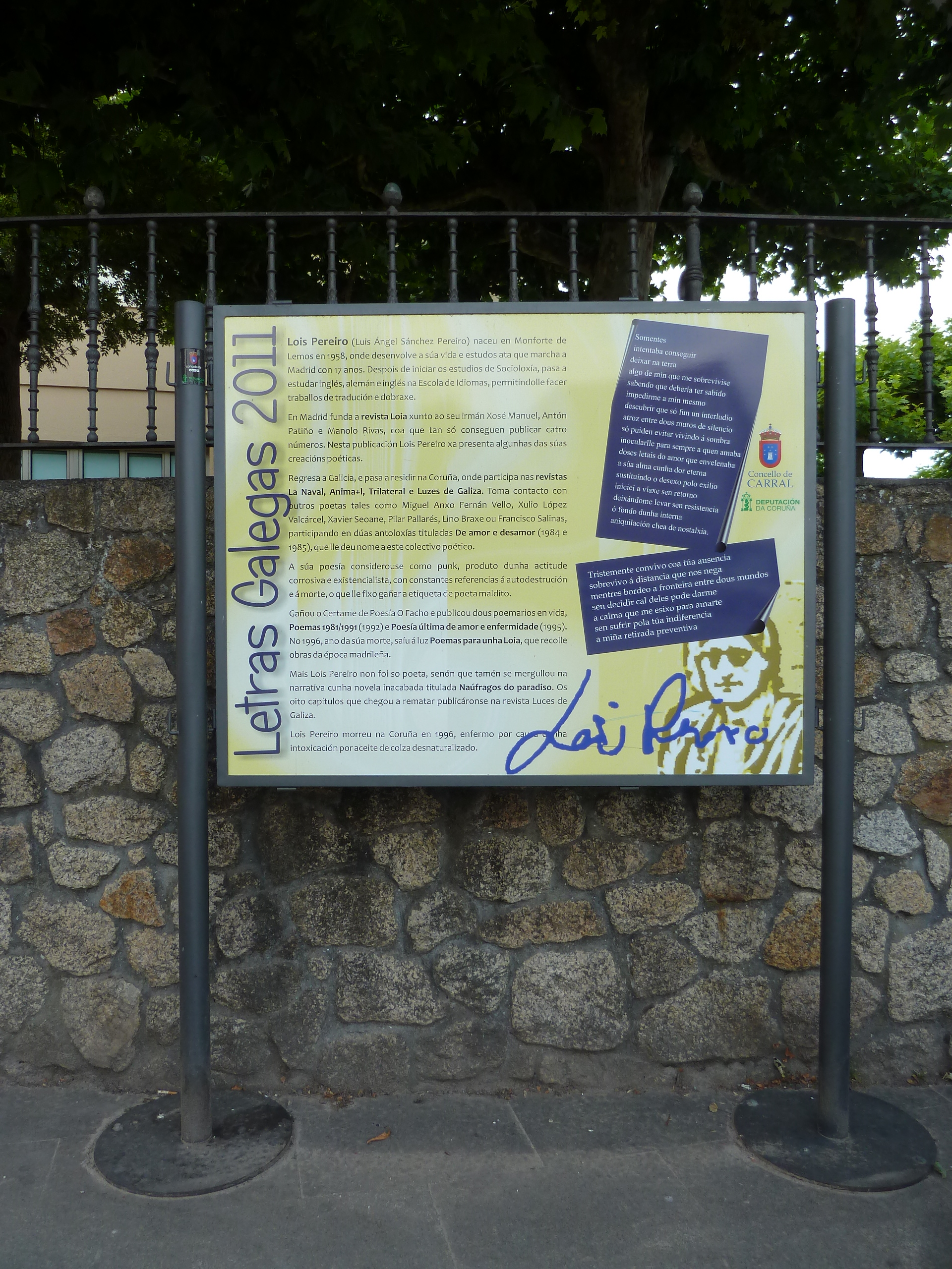 Cartel do concello de Carral co gallo en lembranza do día das Letras Galegas do ano 2011 a Lois Pereiro